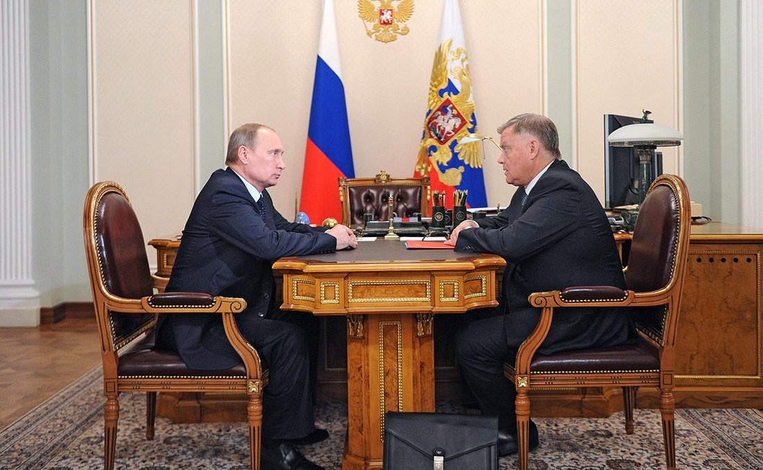 Рабочая встреча Владимира Путина с президентом компании «Российские железные дороги» Владимиром Якуниным